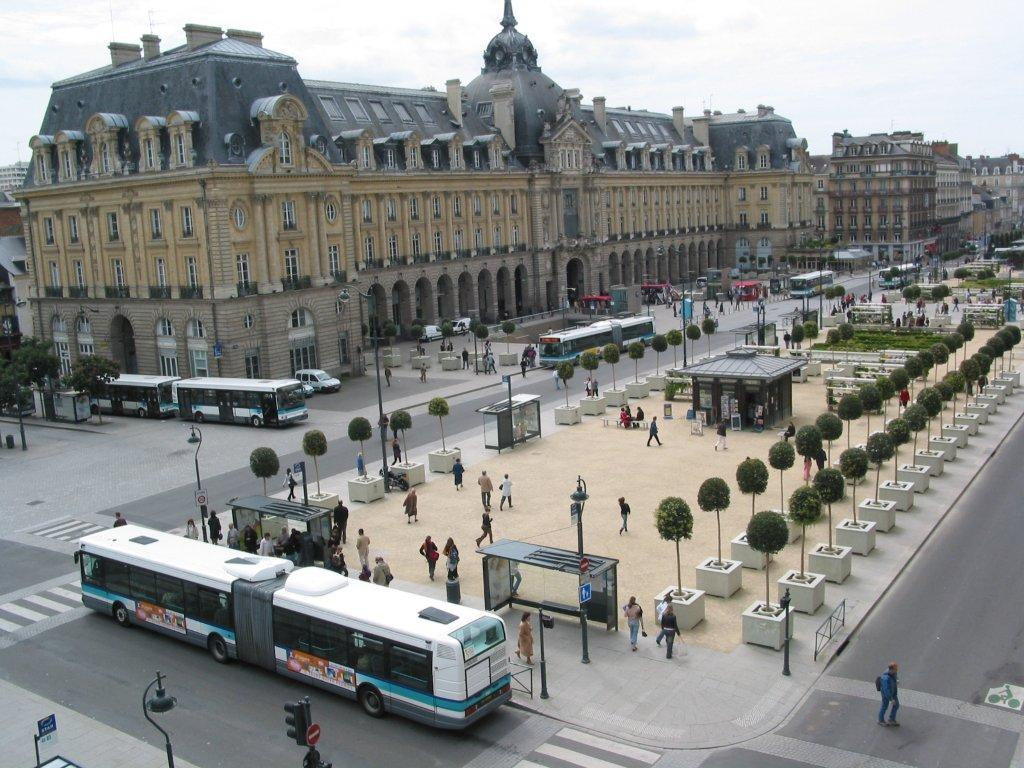 Place de la République à Rennes, lieu d'échange multimodal au pied du palais du commerce